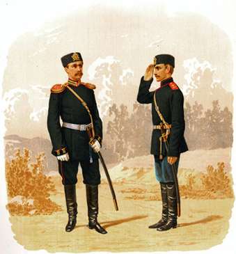 Гренадерская и Полевая конная артиллерия. Обер-Офицер 1-й Гренадерской Артиллерийской Бригады ( в парадной форме, вне строя ) и Рядовой 2-й Конно-Артиллерийской Батареи ( в обыкновенной форме, вне строя ) ( прик. по воен. вед. 1881 г. № 313 )